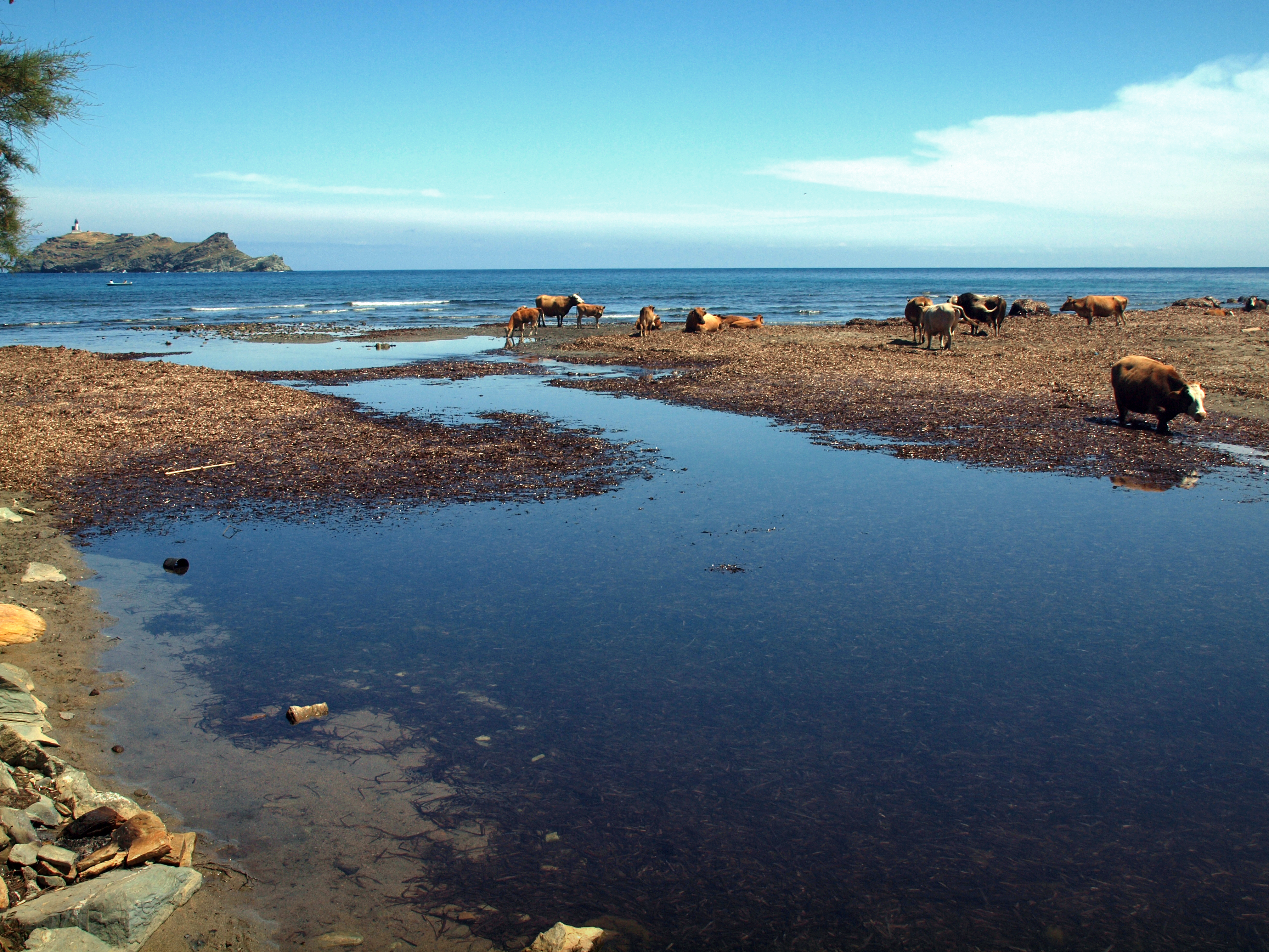 Ersa (Corse) - Embouchure de l'Acqua Tignese